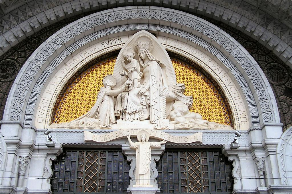 basilique notre dame du rosaire a lourdes